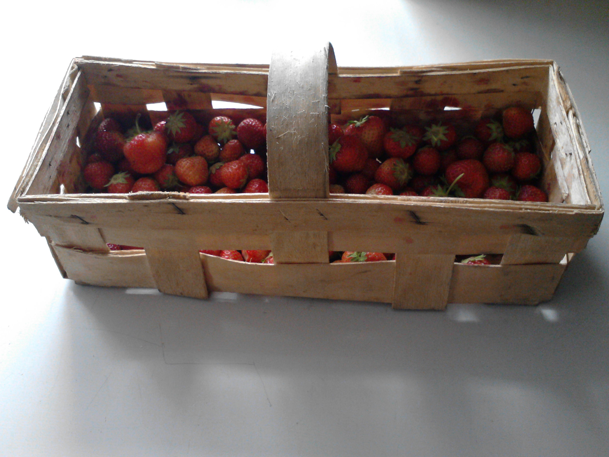 Kobiałka - koszyk na owoce